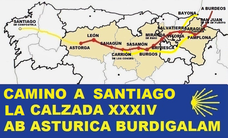 La Calzada XXXIV, Asturica - Burdigalam